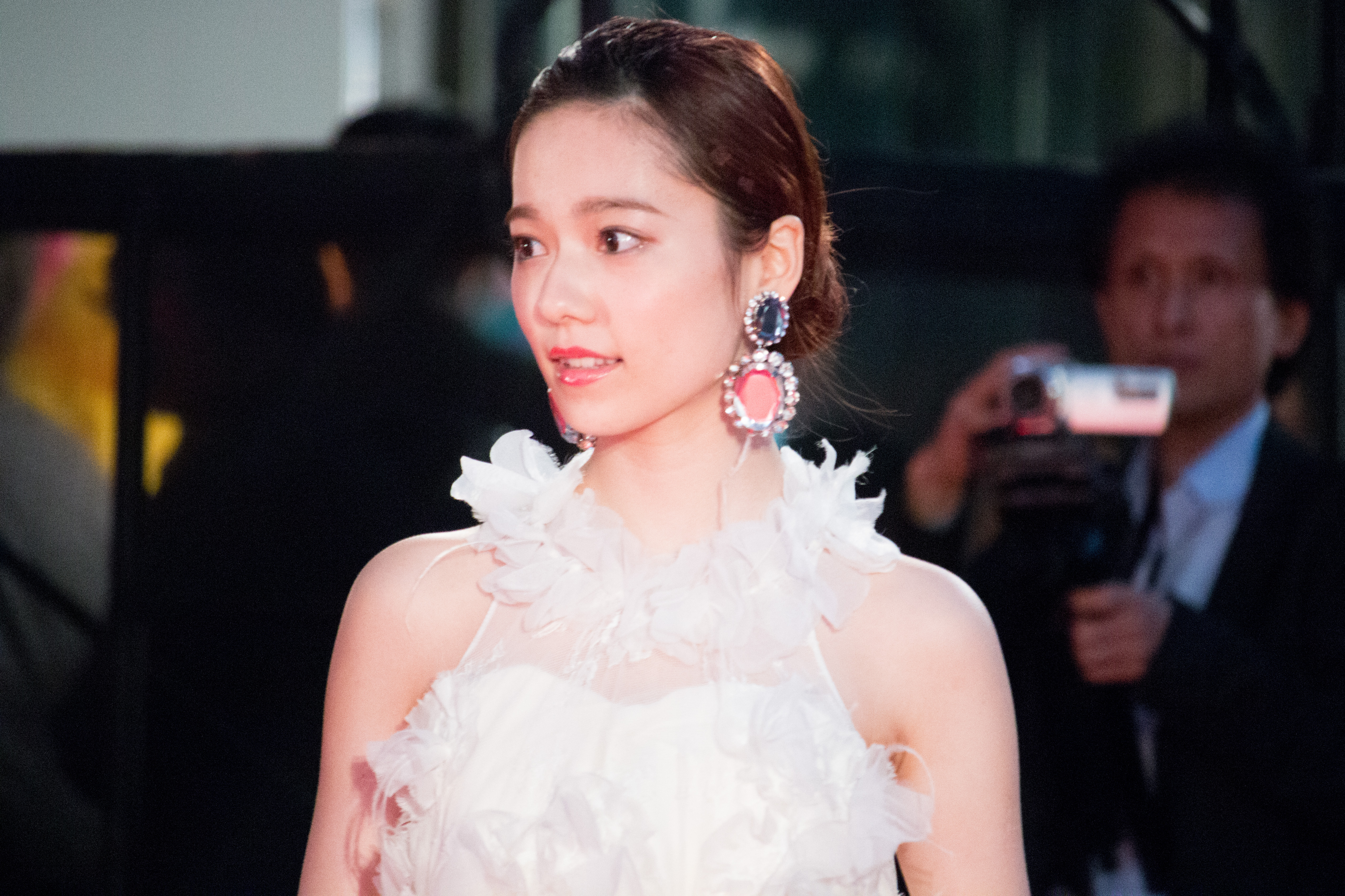 第28回 東京国際映画祭 オープニングセレモニー 島崎遥香 (劇場霊)